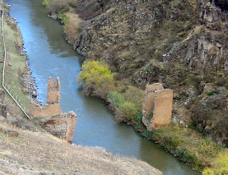 Aras nehri; sag taraf Ermenistan, sol taraf Türkiye, ipek yolu köprüsü vr sol yukarida manastir harabeleri